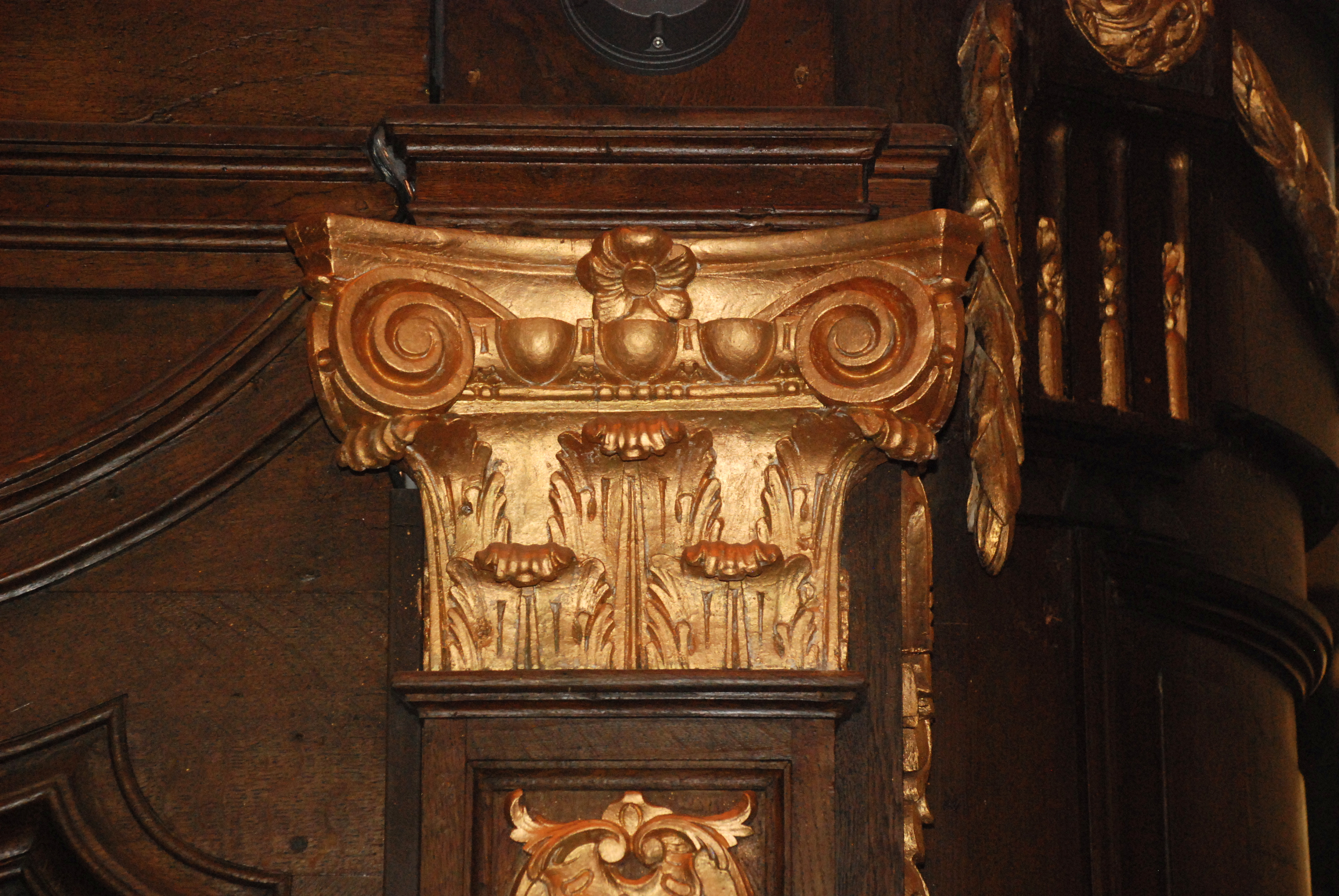 Belgique - Brabant wallon - Église Saint-Martin de Ways